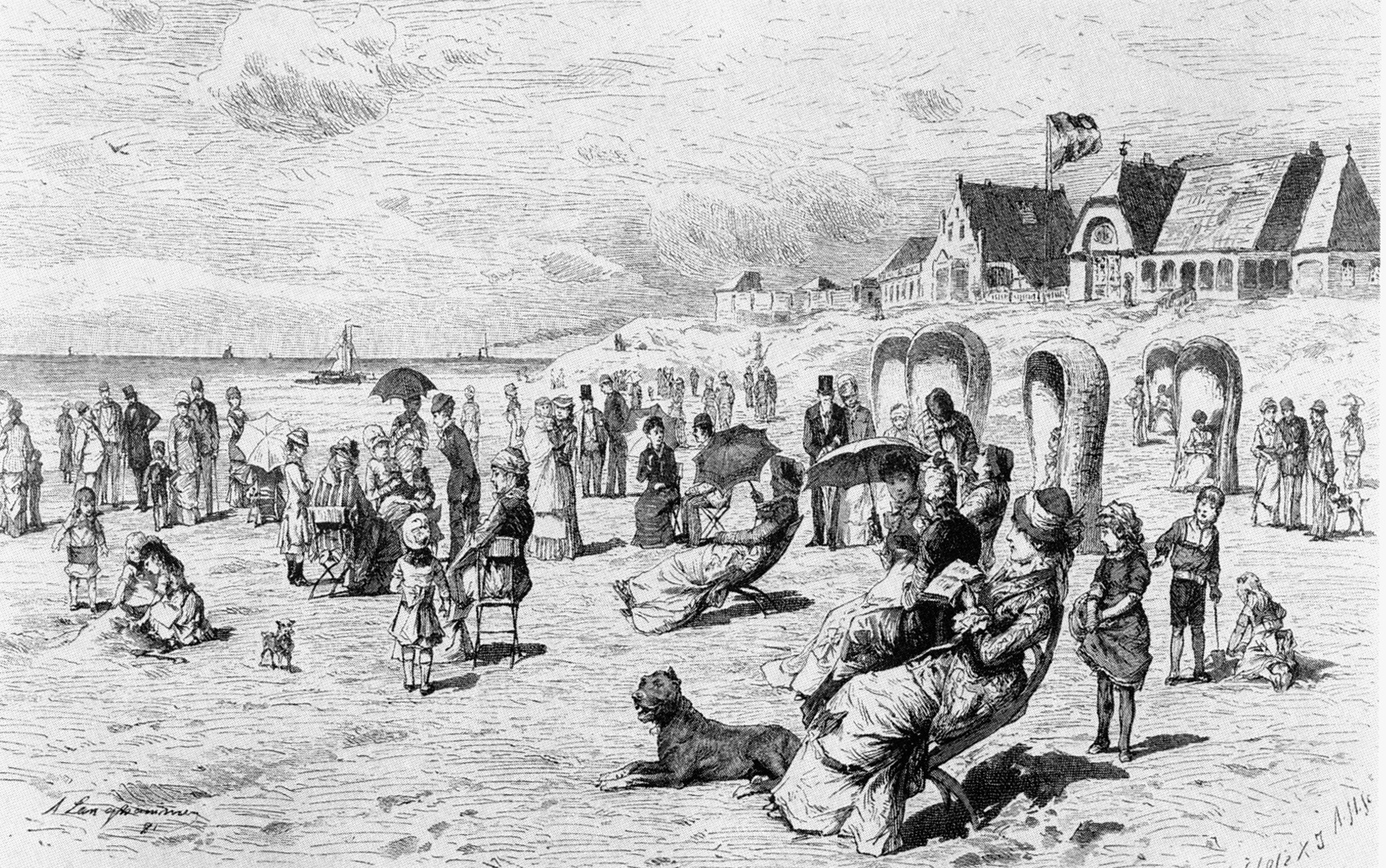 strandkörbe in norderney